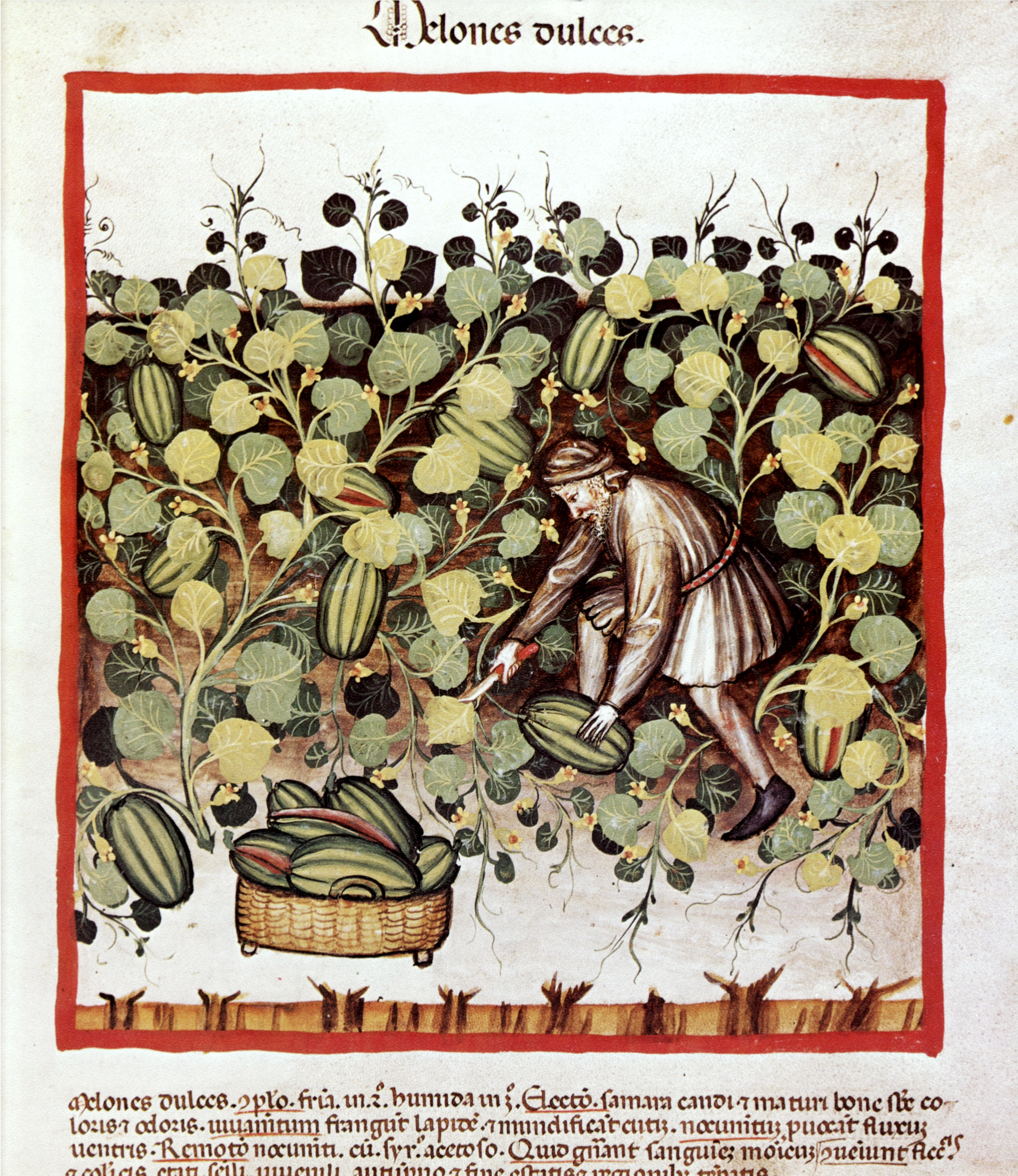 Landmann bei der Melonenernte. Eine Tafel aus dem Wiener Tacuinum Sanitatis, fol. 21 recto (Codex Vindobonensis Series nova 2644 der Österreichischen Nationalbibliothek)